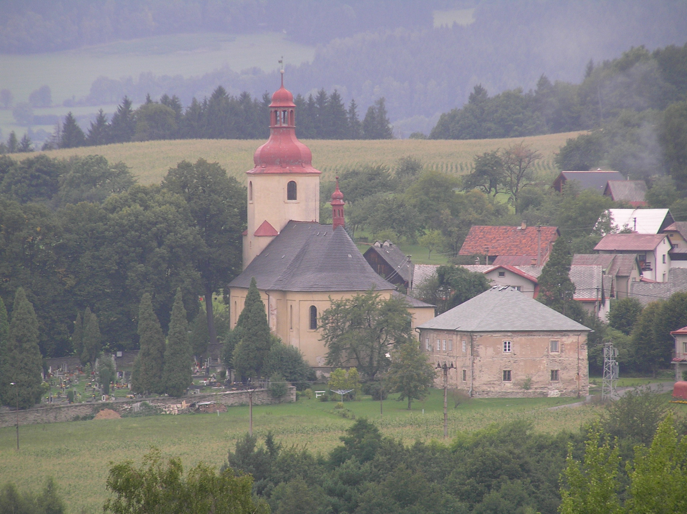 Kostel Nejsvětější Trojice, Bzí (Železný Brod).